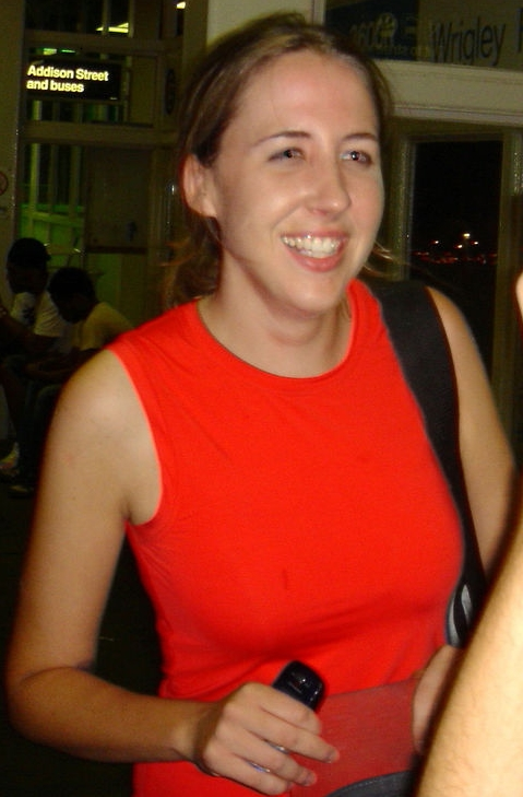 Sarah Haskins in 2005.